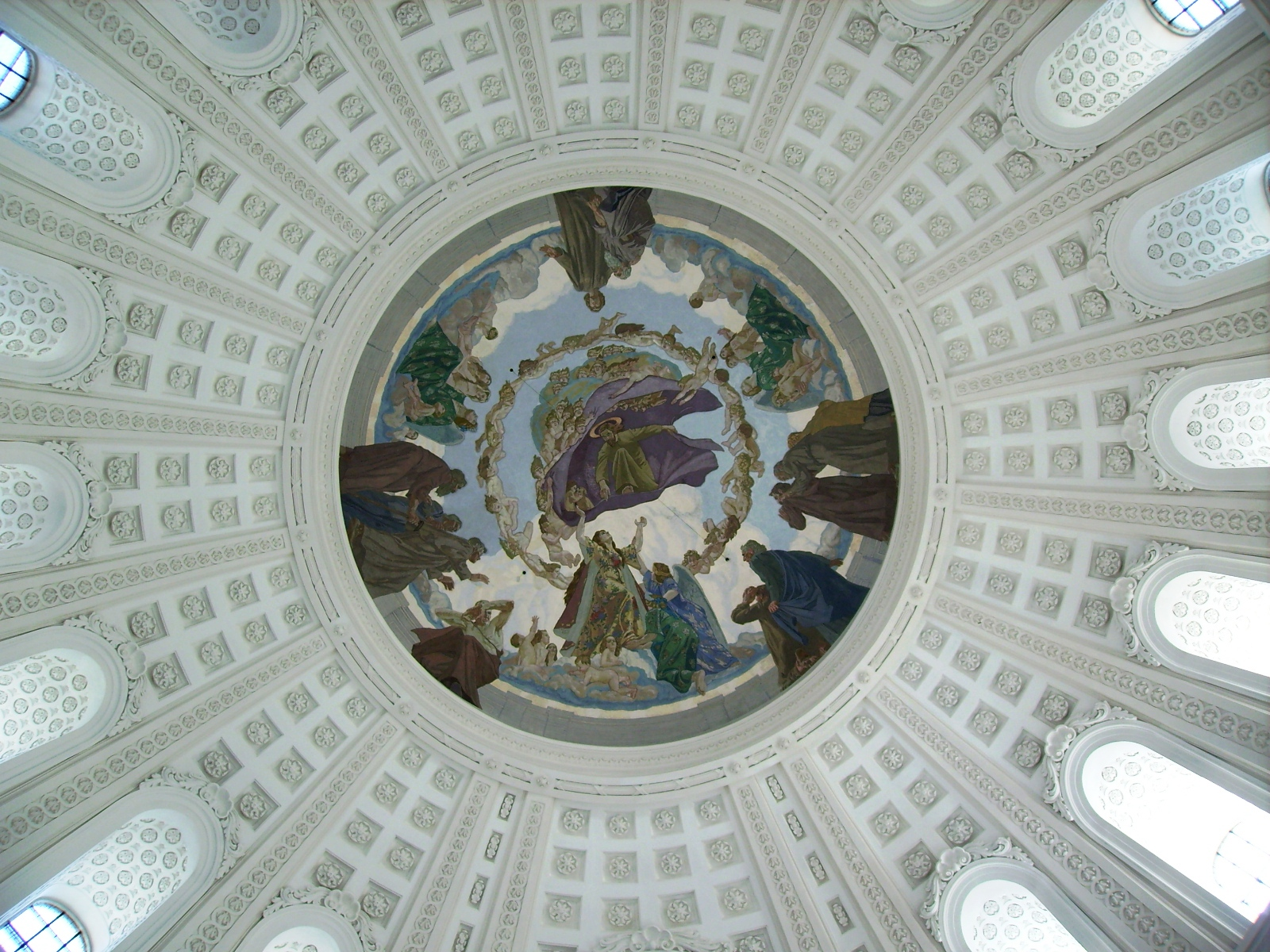 Sankt Blasien Schwarzwald